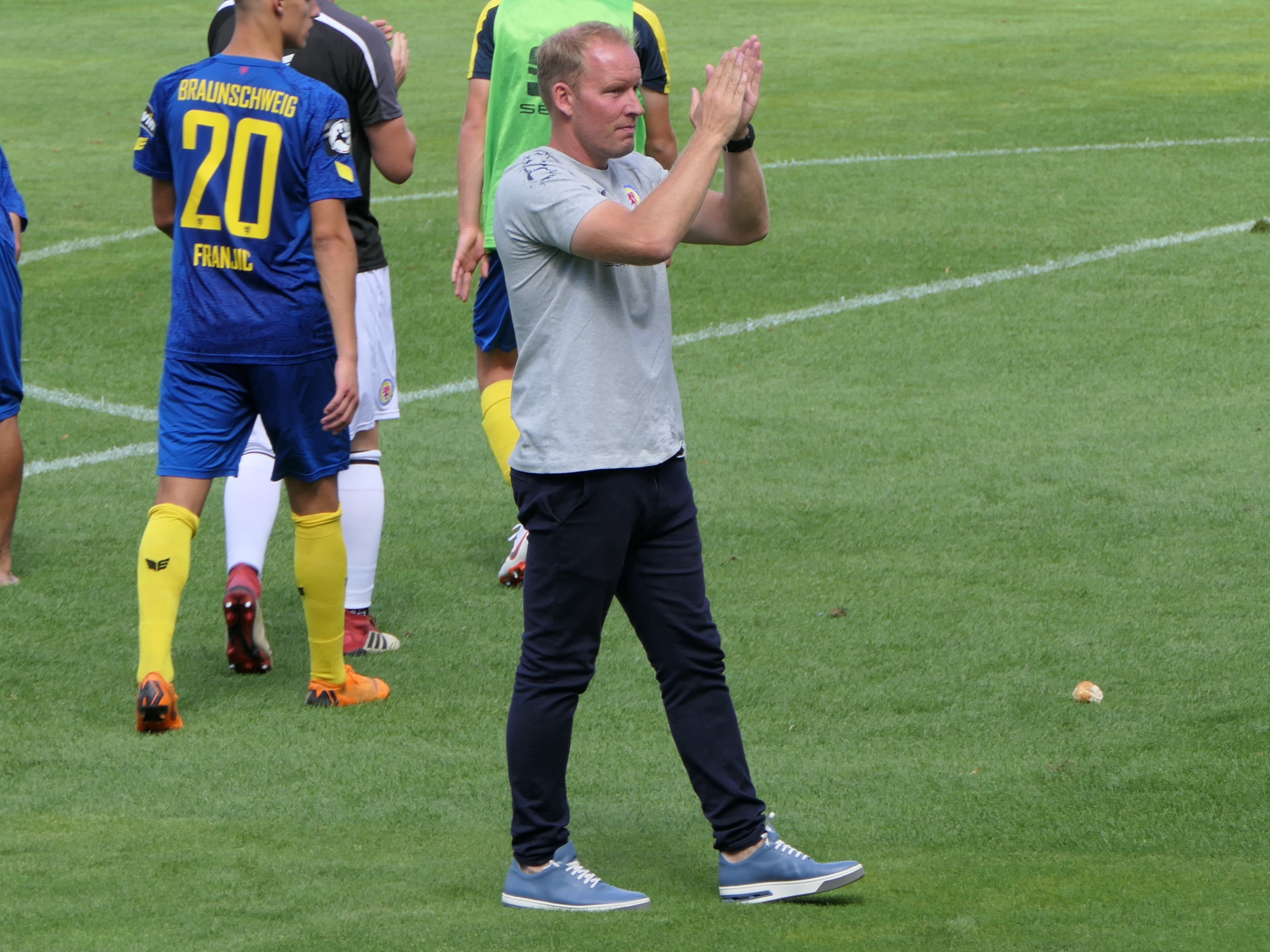 Der Fussballtrainer von Eintracht Braunschweig, Henrik Pedersen, beim Auswärtsspiel beim SV Wehen Wiesbaden am 11.08.2018.